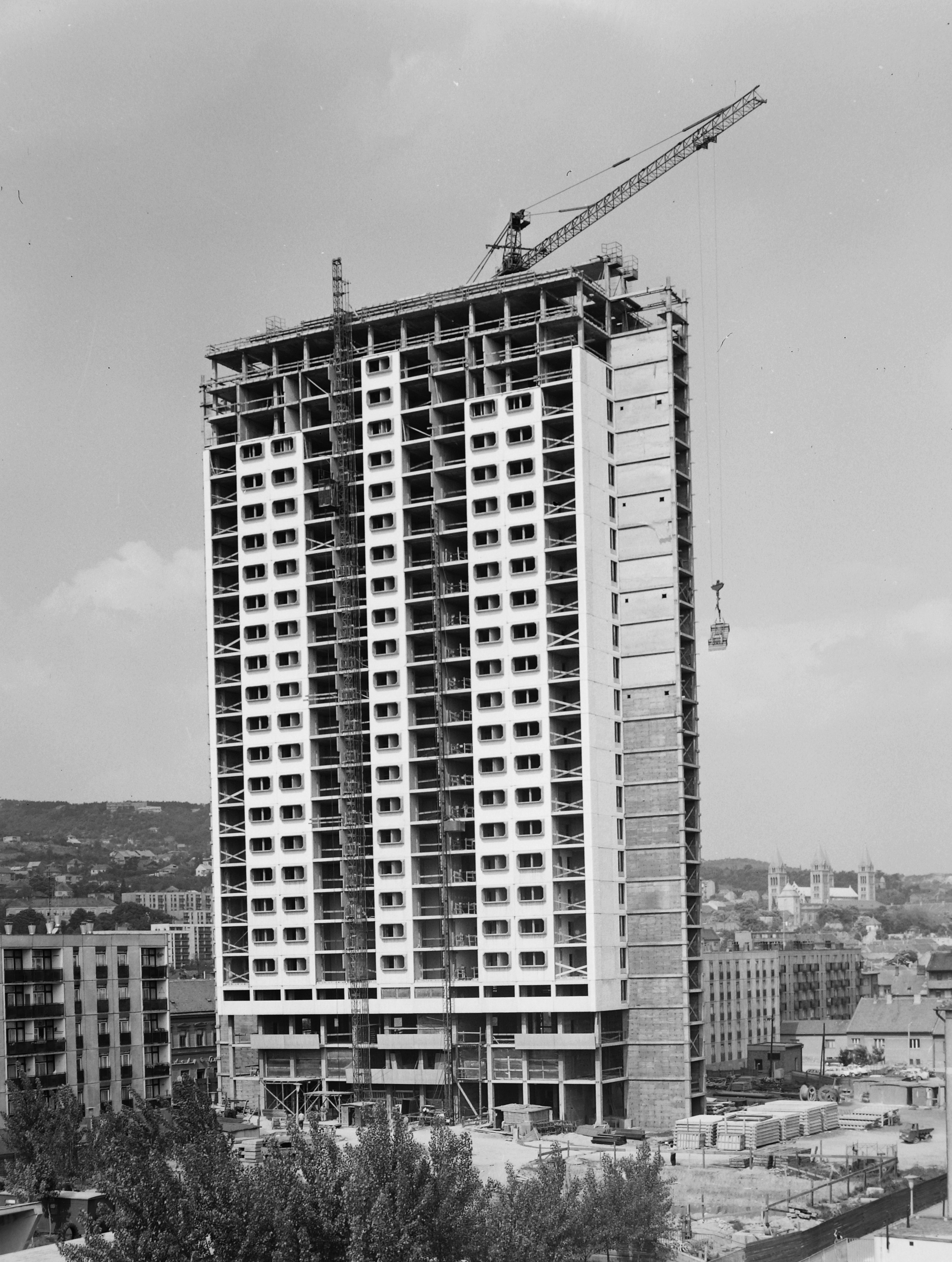 a Magasház építése. Location: Hungary Tags: construction, concrete block of flats, crane, high-rise building Title: a Magasház építése.